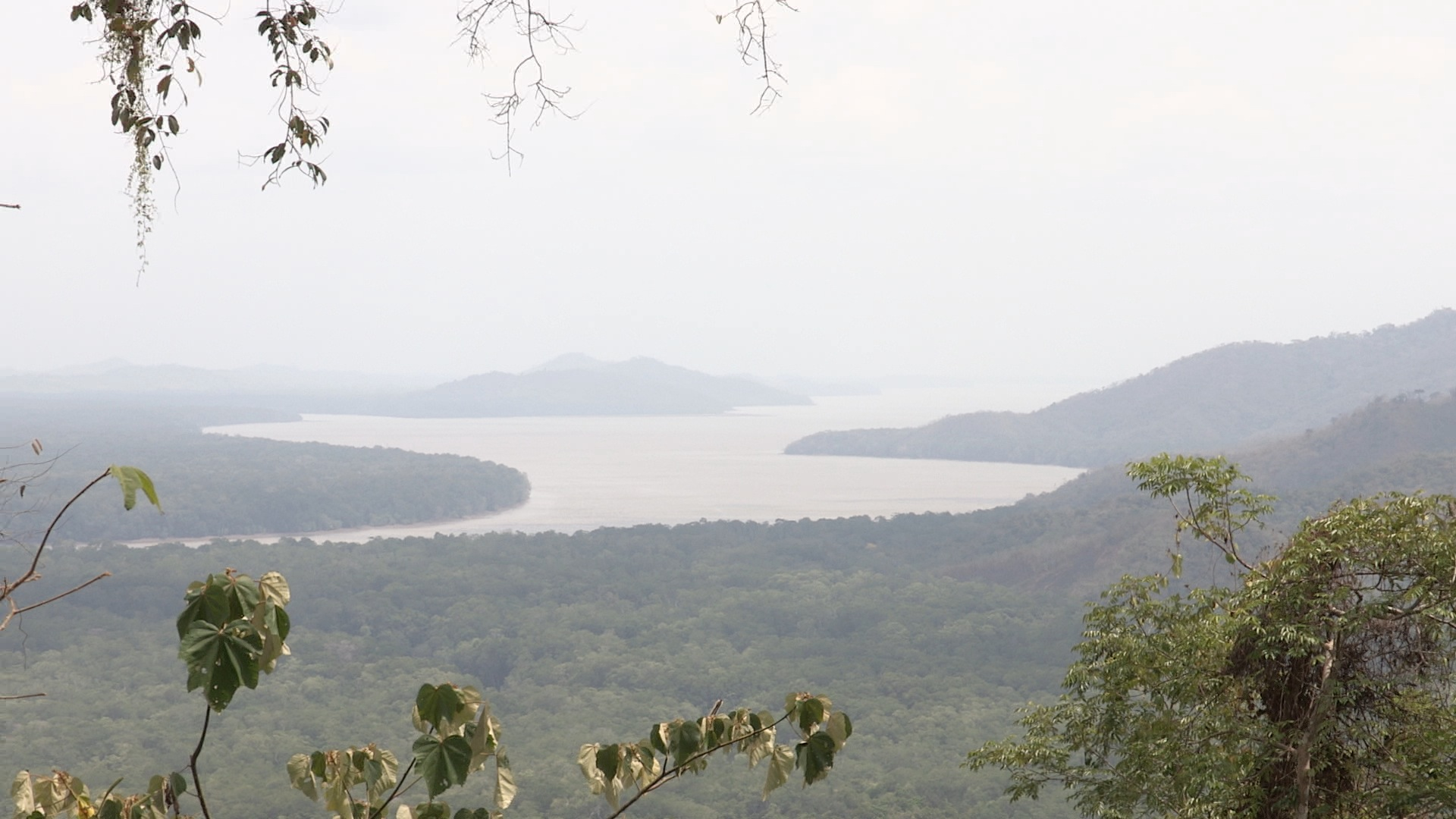 Altos de Urrucallala, lugar del primer avistamiento del Mar del Sur el 25 de Septiembre